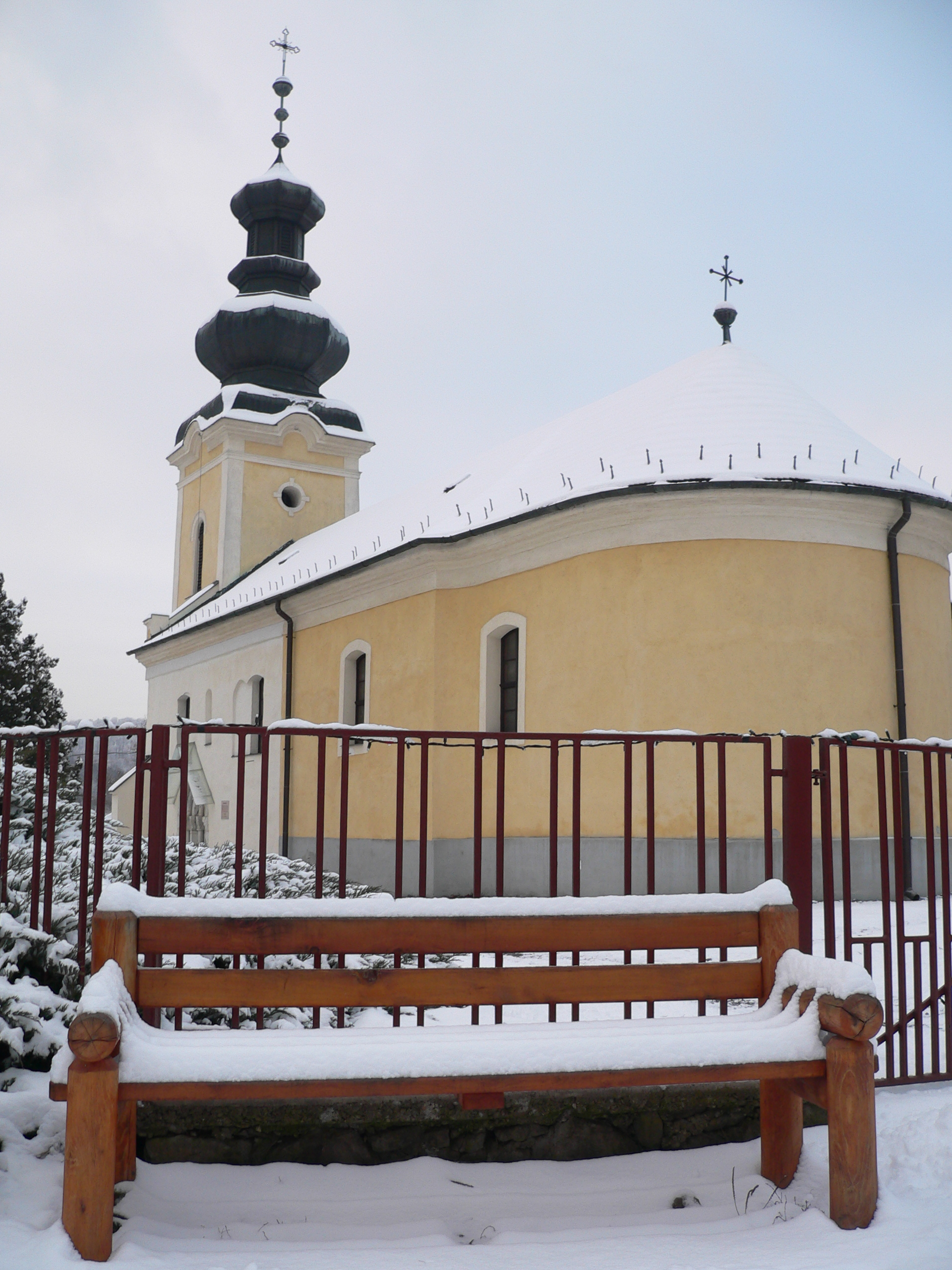 Füzér Római katolikus templom